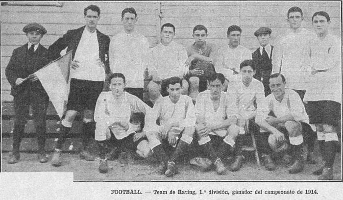 The Racing Club de Avellaneda football team that won its second Primera División title.